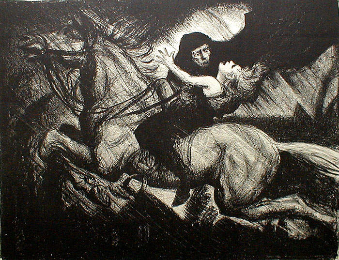 Der Erlkönig (nach der gleichnamigen Ballade von Johann Wolfgang von Goethe)